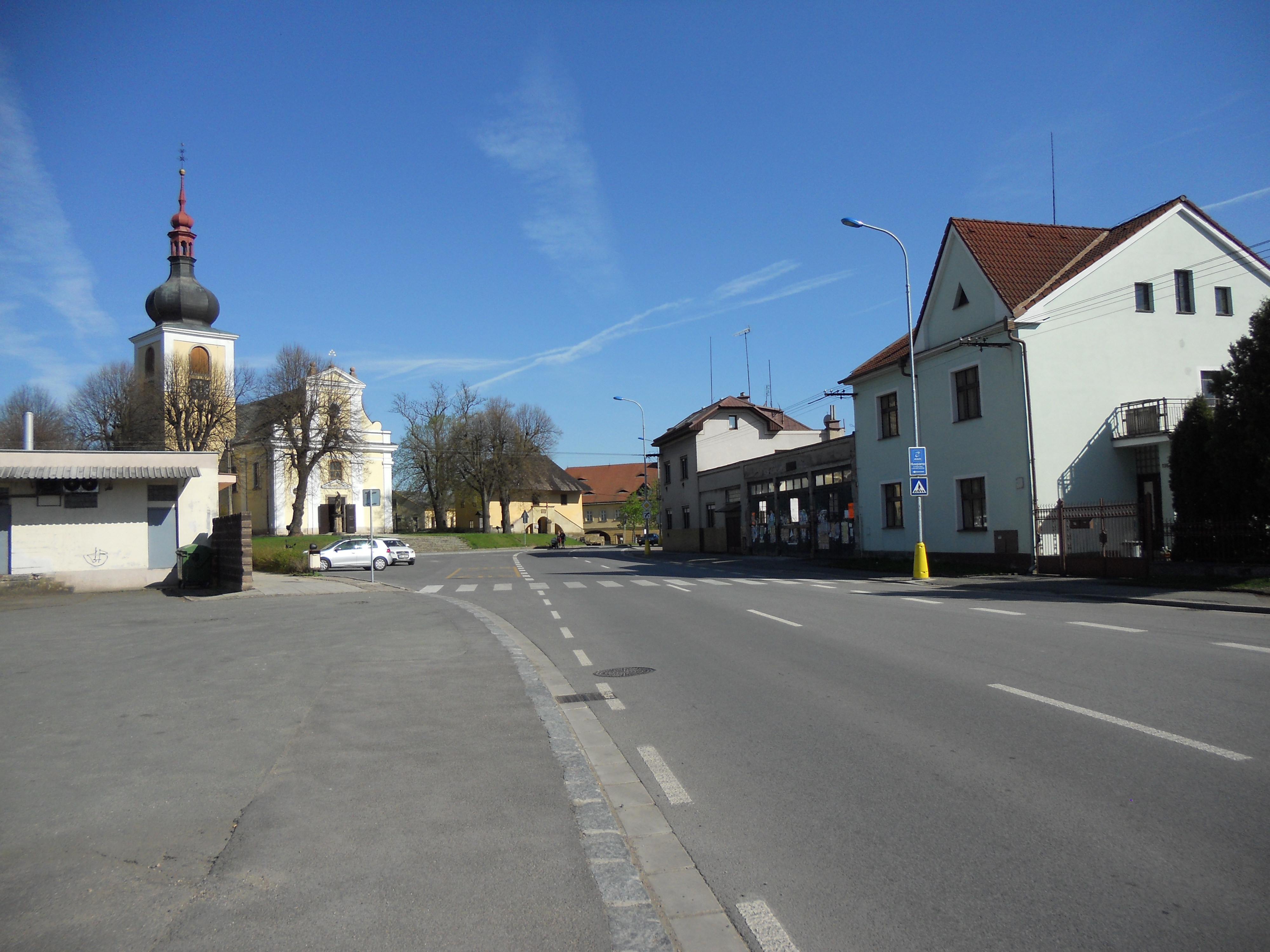 Malá Skalice - pohled od hlavní silnice, lze vidět prodejnu potravin, autobusovou zastávku a v pozadí kostel, faru a muzeum